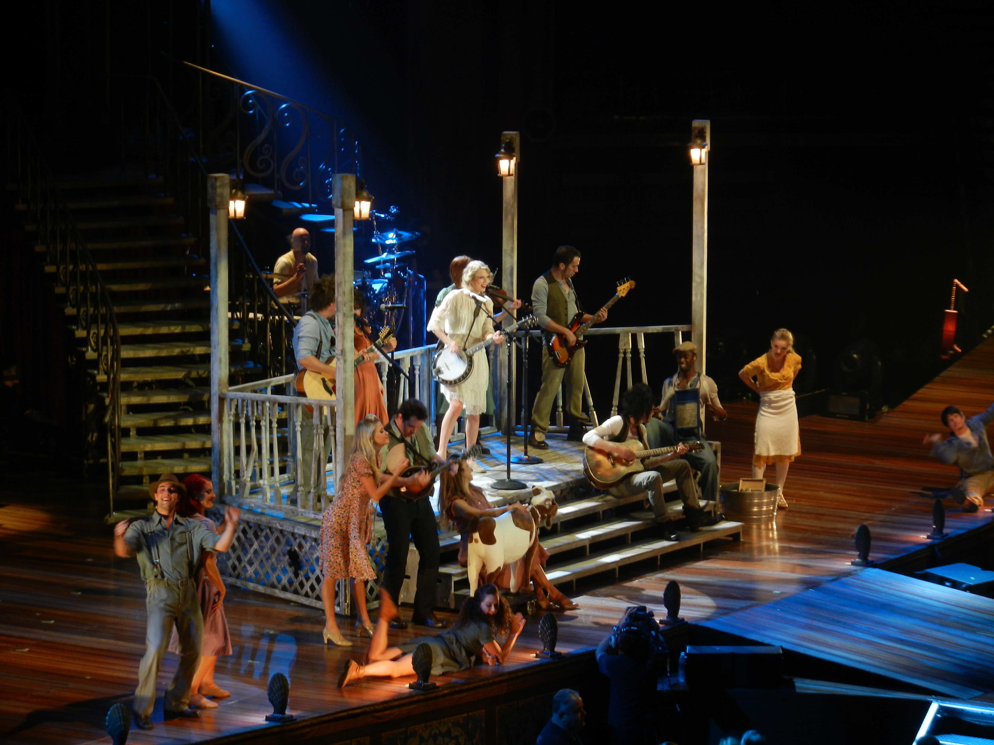 Taylor Swift Live in Vancouver in 2011